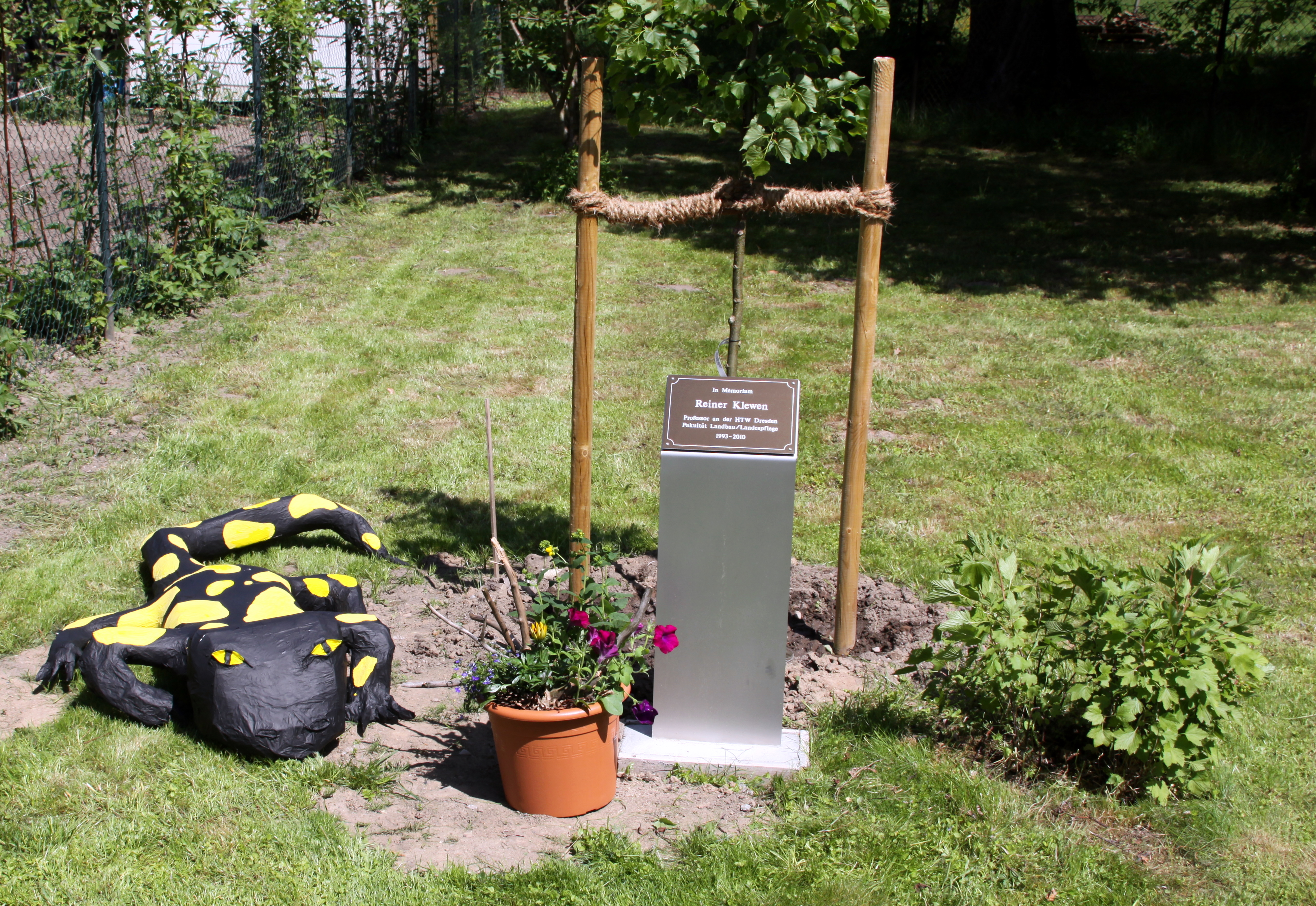 Gedenkbaum mit gebastelten Salamander, Blumen und Stele zur Erinnerung an Professor Reiner Klewen